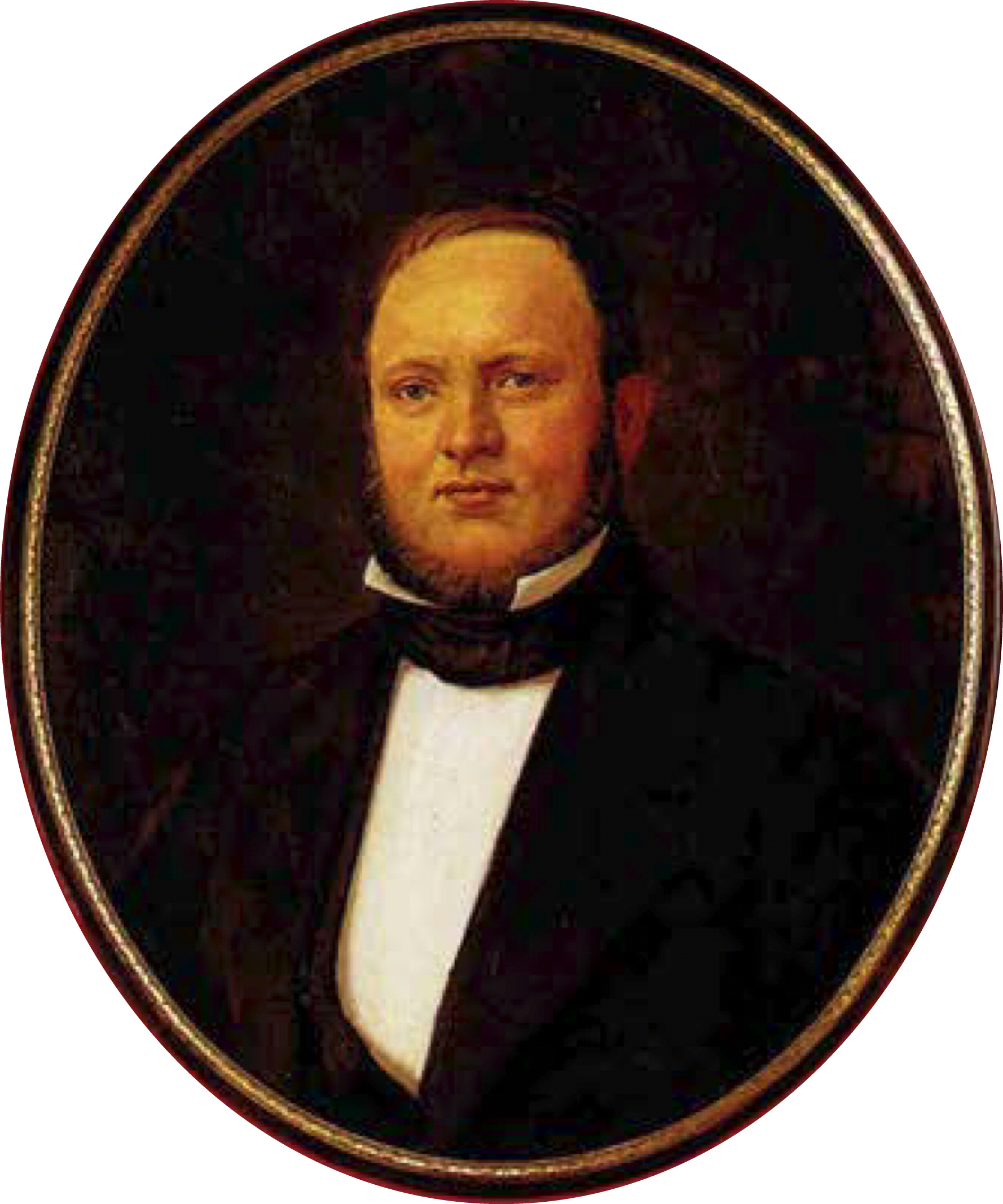 요한 프레드리히 웨스코트(1821~1876)